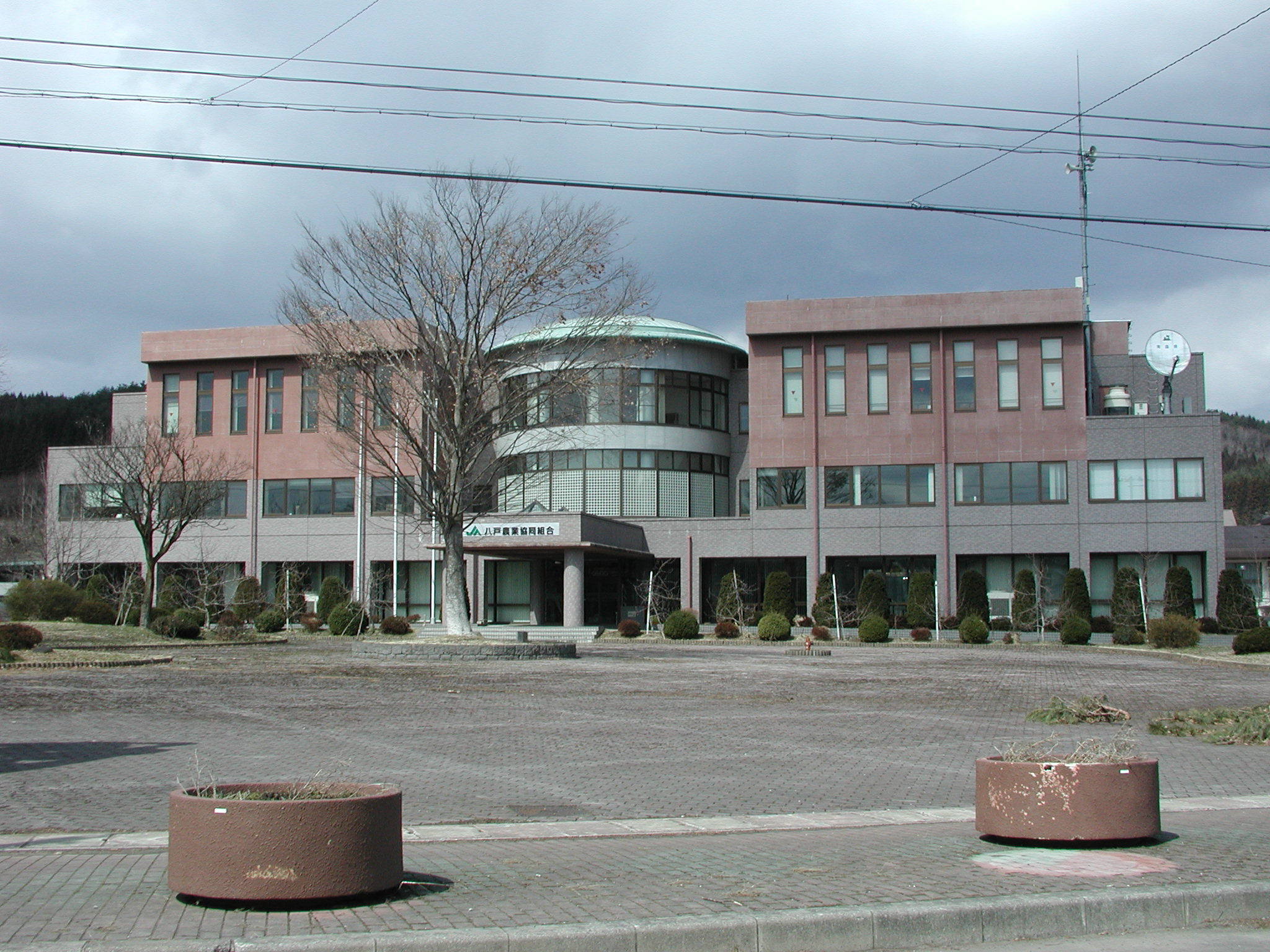 八戸農業協同組合 本所（経済事業） 元：倉石村役場 庁舎（五戸町との合併後は「五戸町役場 倉石分庁舎」）